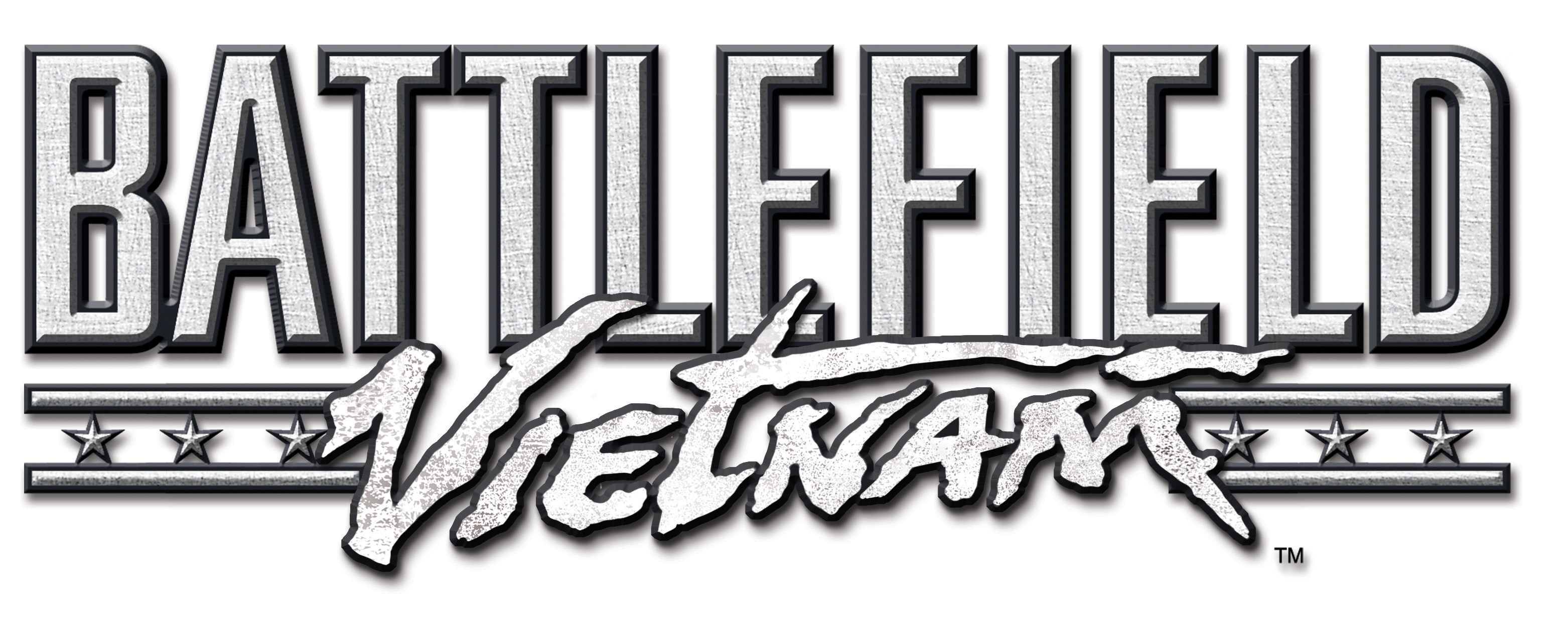 Logo del videojuego Battlefield Vietnam.